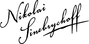 Автограф Николая Петровича Синебрюхова (1788-1848)